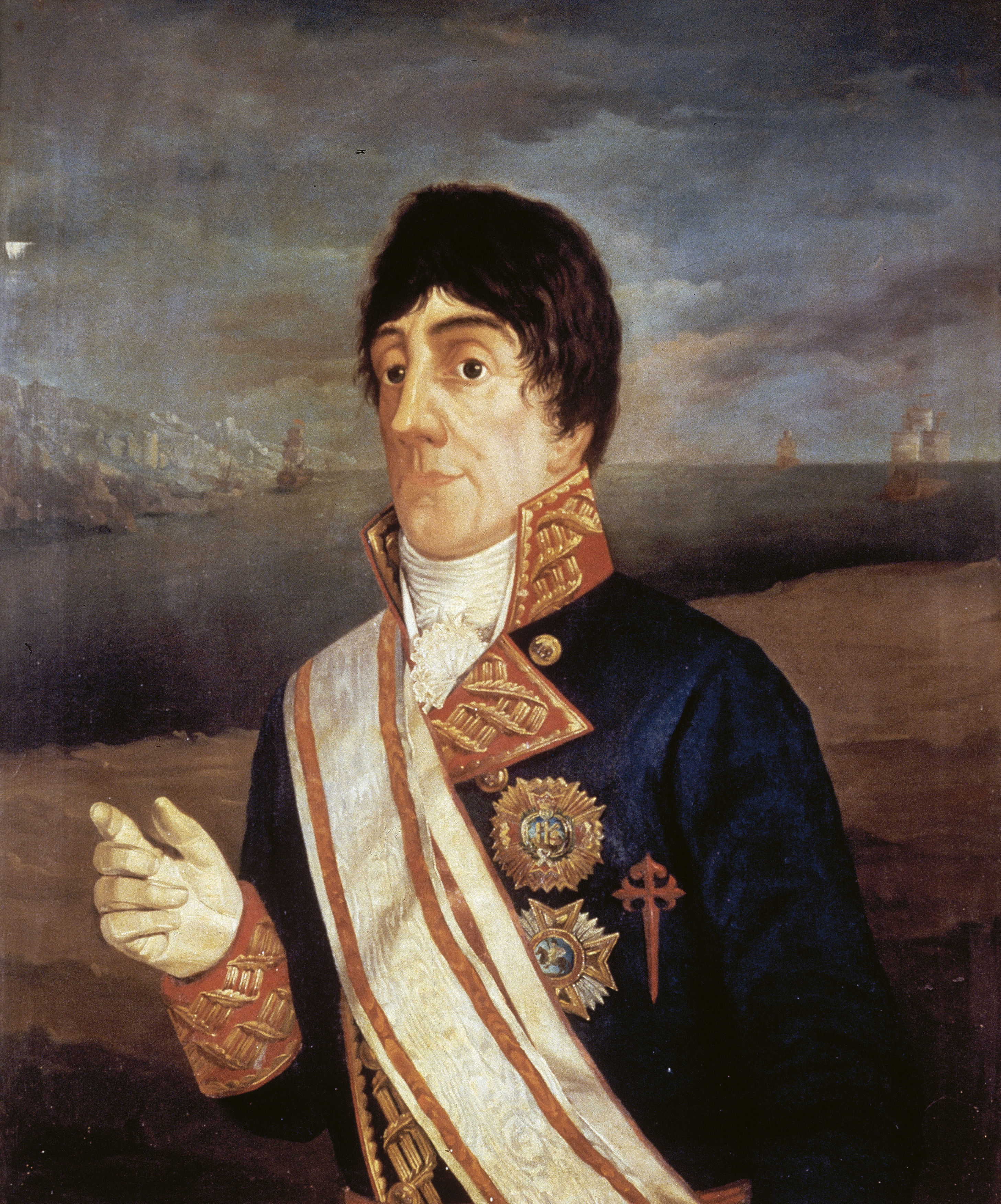 Retrato de José Joaquín de Bustamante y Guerra (1759-1825), que fue caballero de la Orden de Santiago, teniente general de la Real Armada Española, capitán general de Guatemala y gobernador de Montevideo.